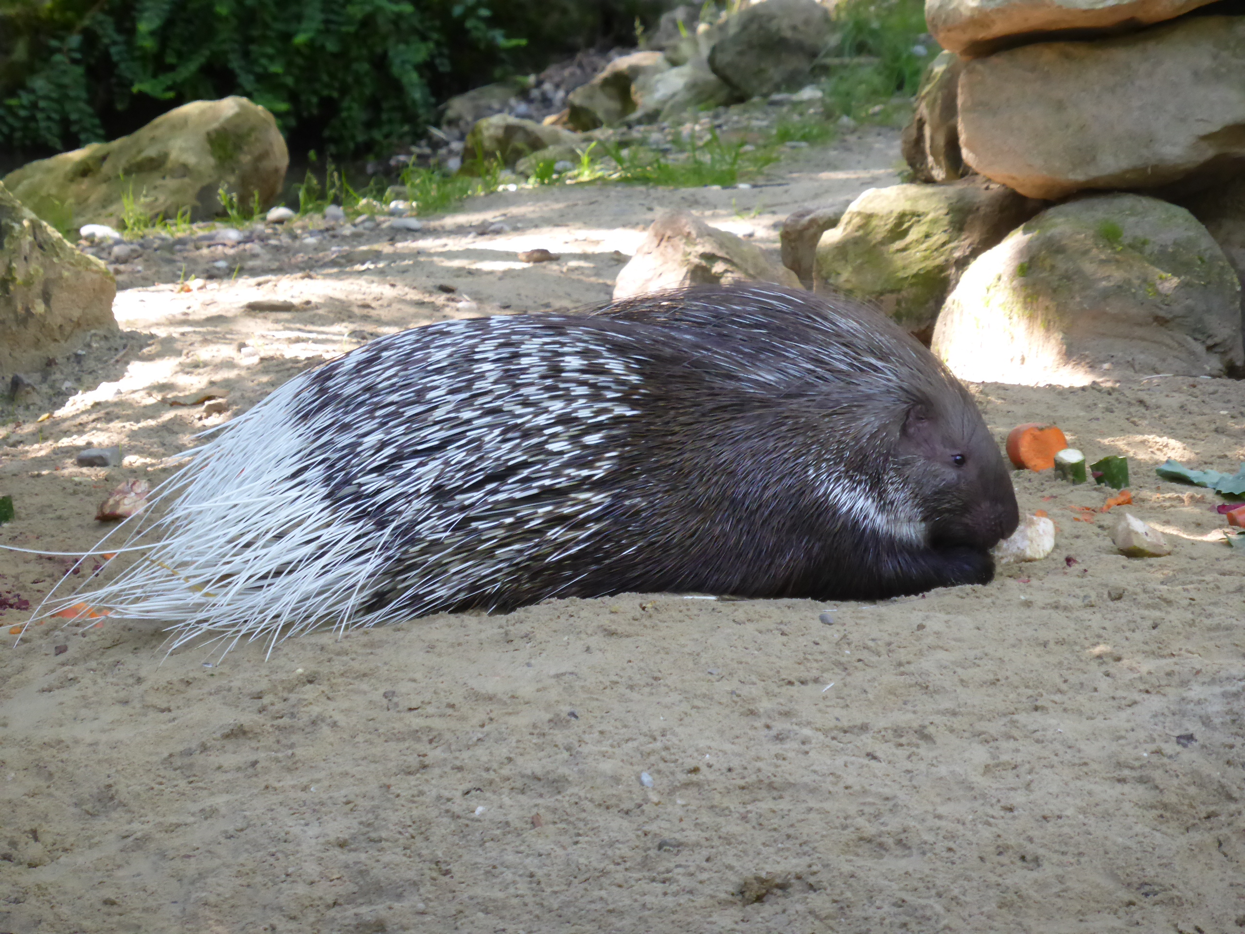 Stachelschwein im Tierpark Hellabrunn (München)